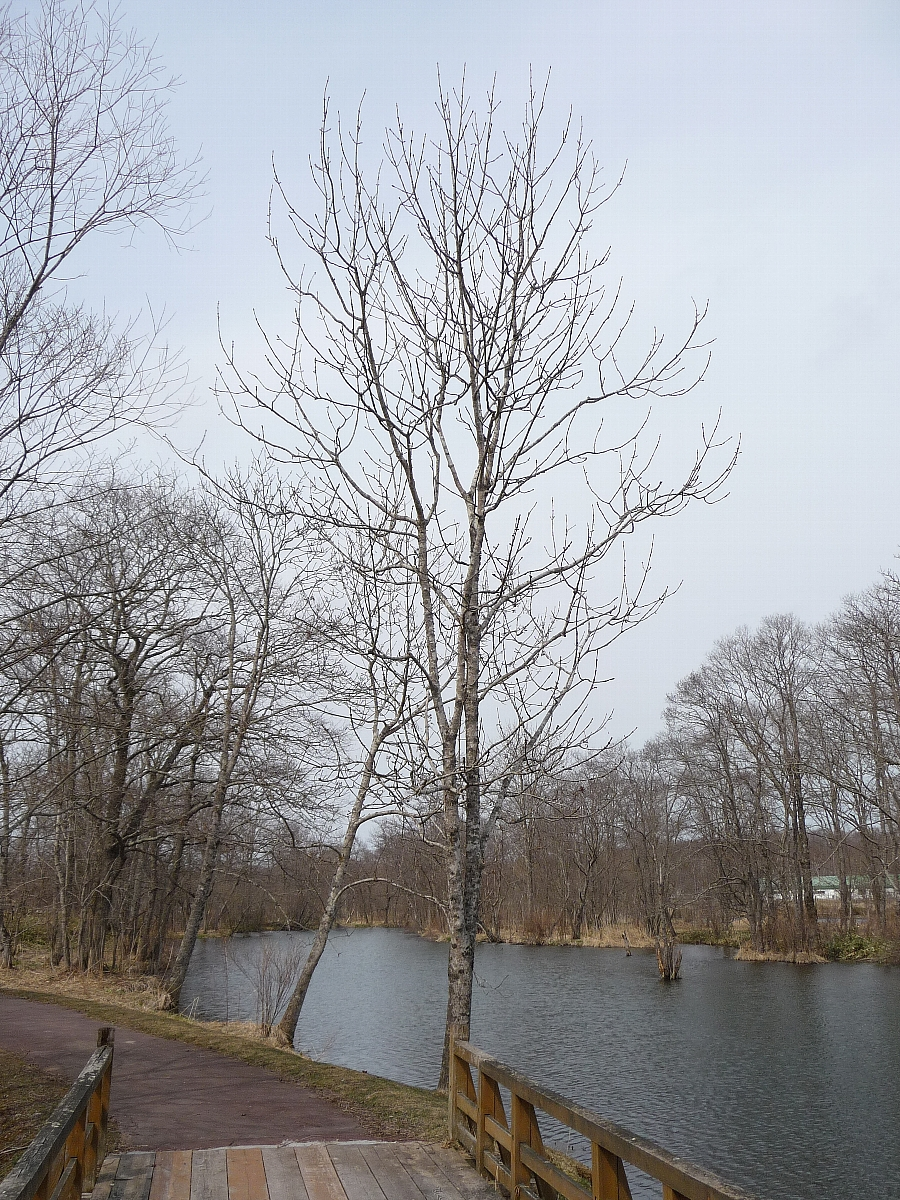 葉が出ていない状態のヤチダモ。 Fraxinus_mandshurica_var._japonica